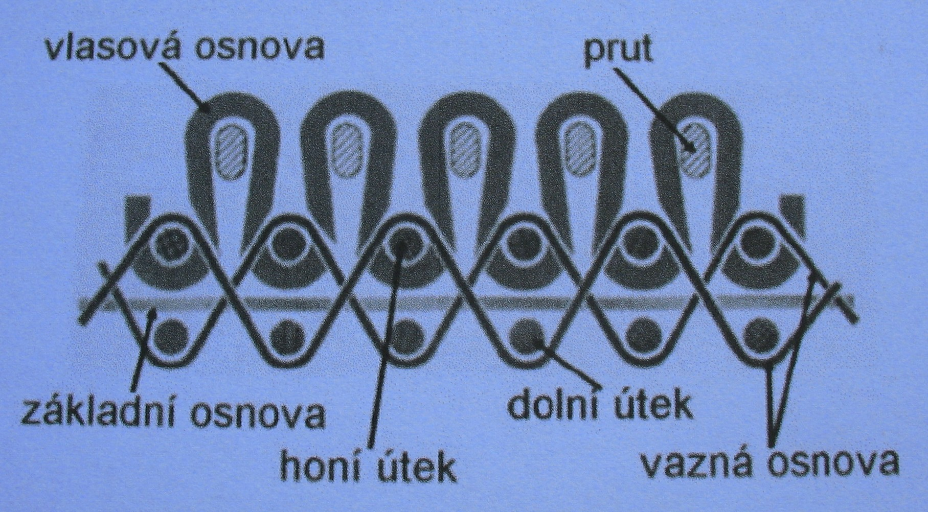 Schema: Rutengewebe